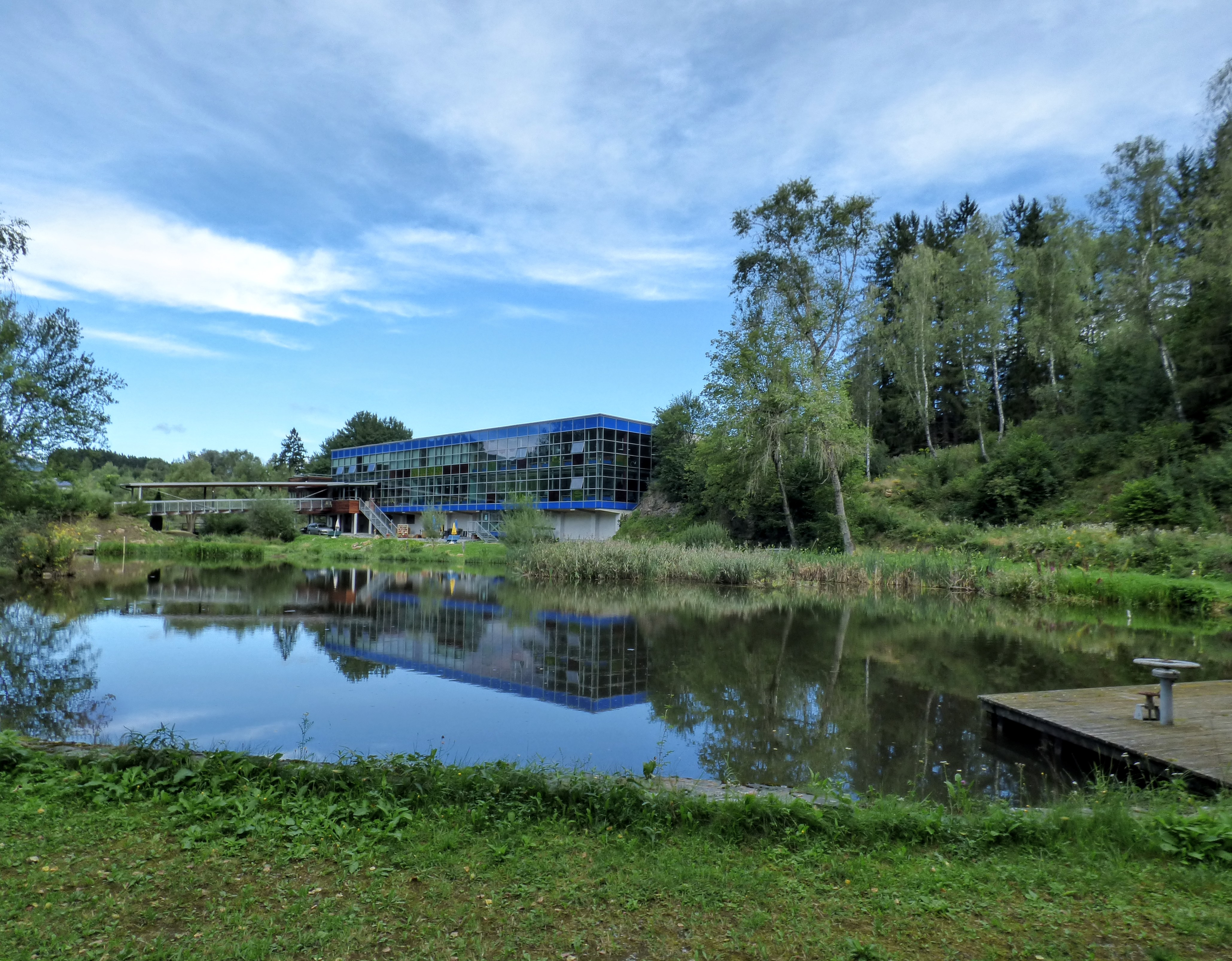 Natechnikum-Ausstellungsgebäude am Stadlober Teich, ehem. Gemeinde Mariahof, heute Gemeinde Neumarkt in der Steiermark.